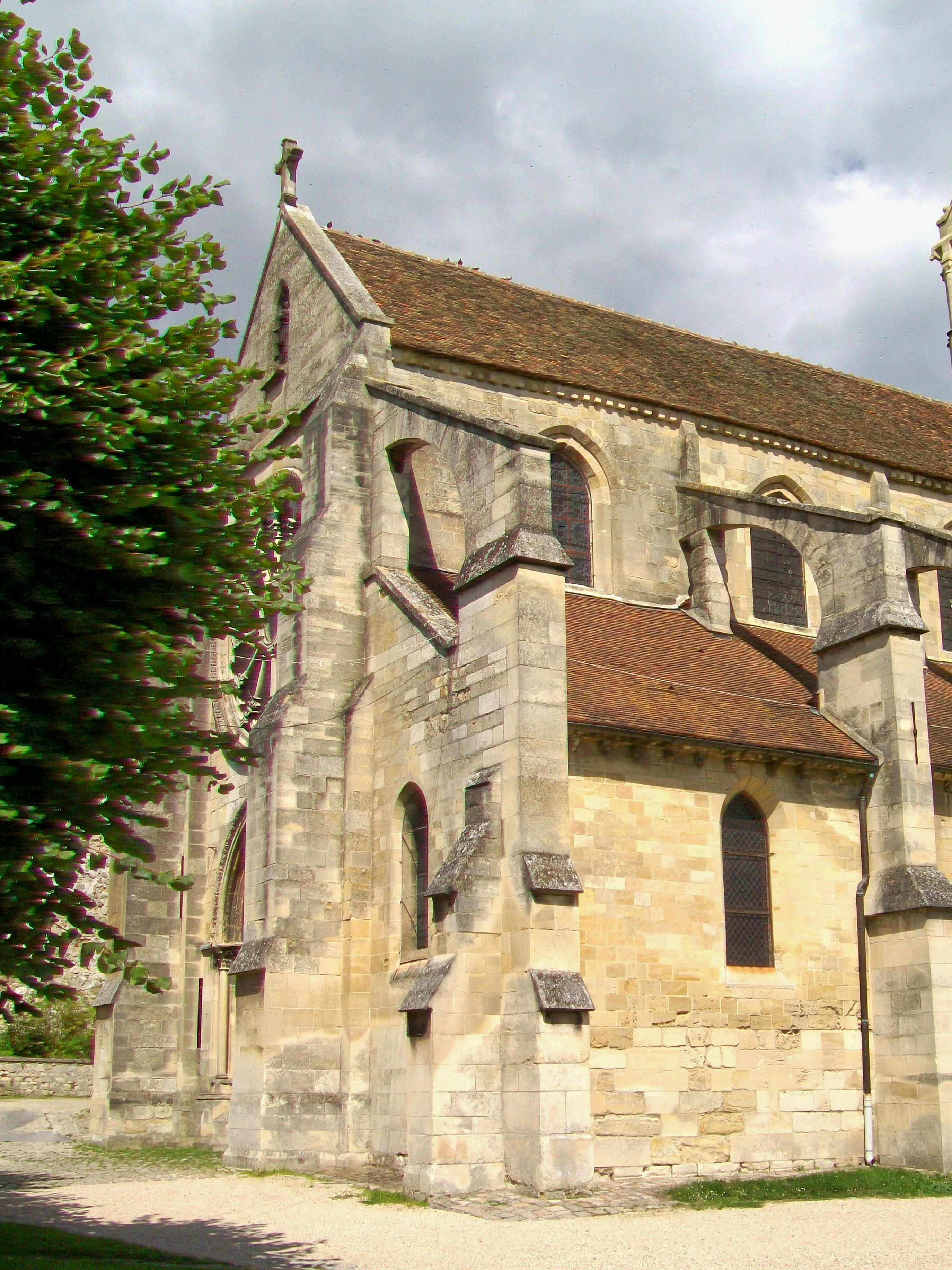 La façade occidentale de l'église.